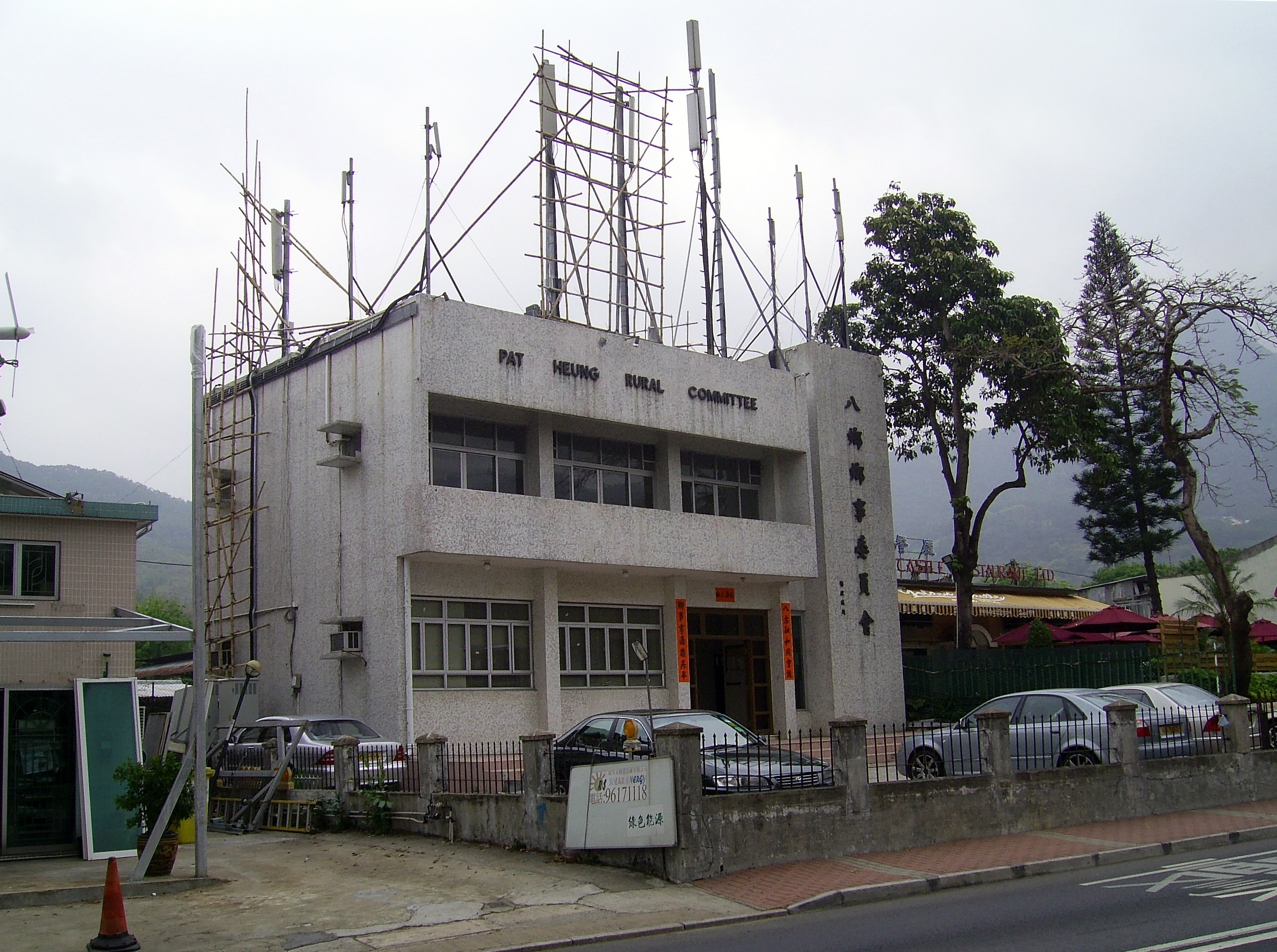 中文（香港）: 八鄉鄉事委員會